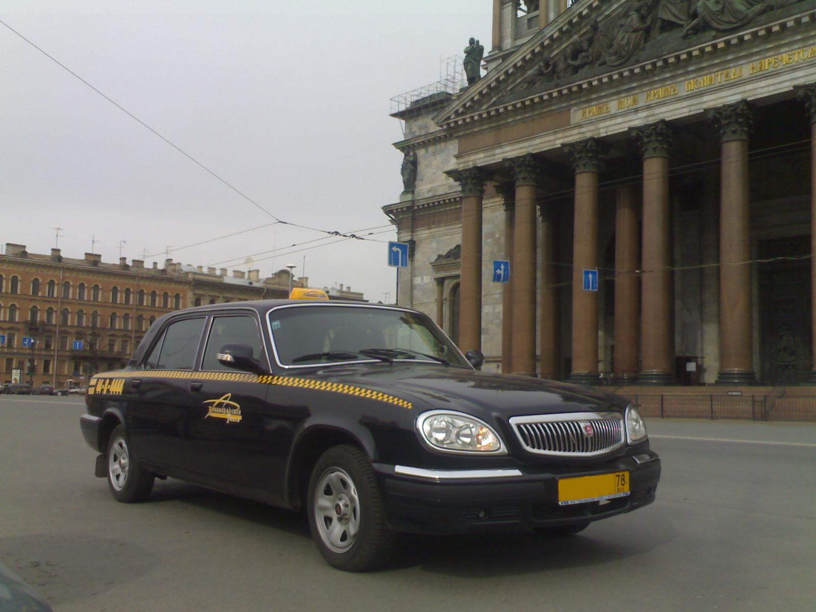 Автомобиль "Волга" ГАЗ 31155 - "Ленинградского такси"